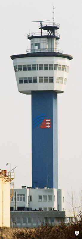 Gdańsk Stogi. Port Gdańsk – wieża służby dyżurnej kapitanatu, latarnia w Porcie Północnym.